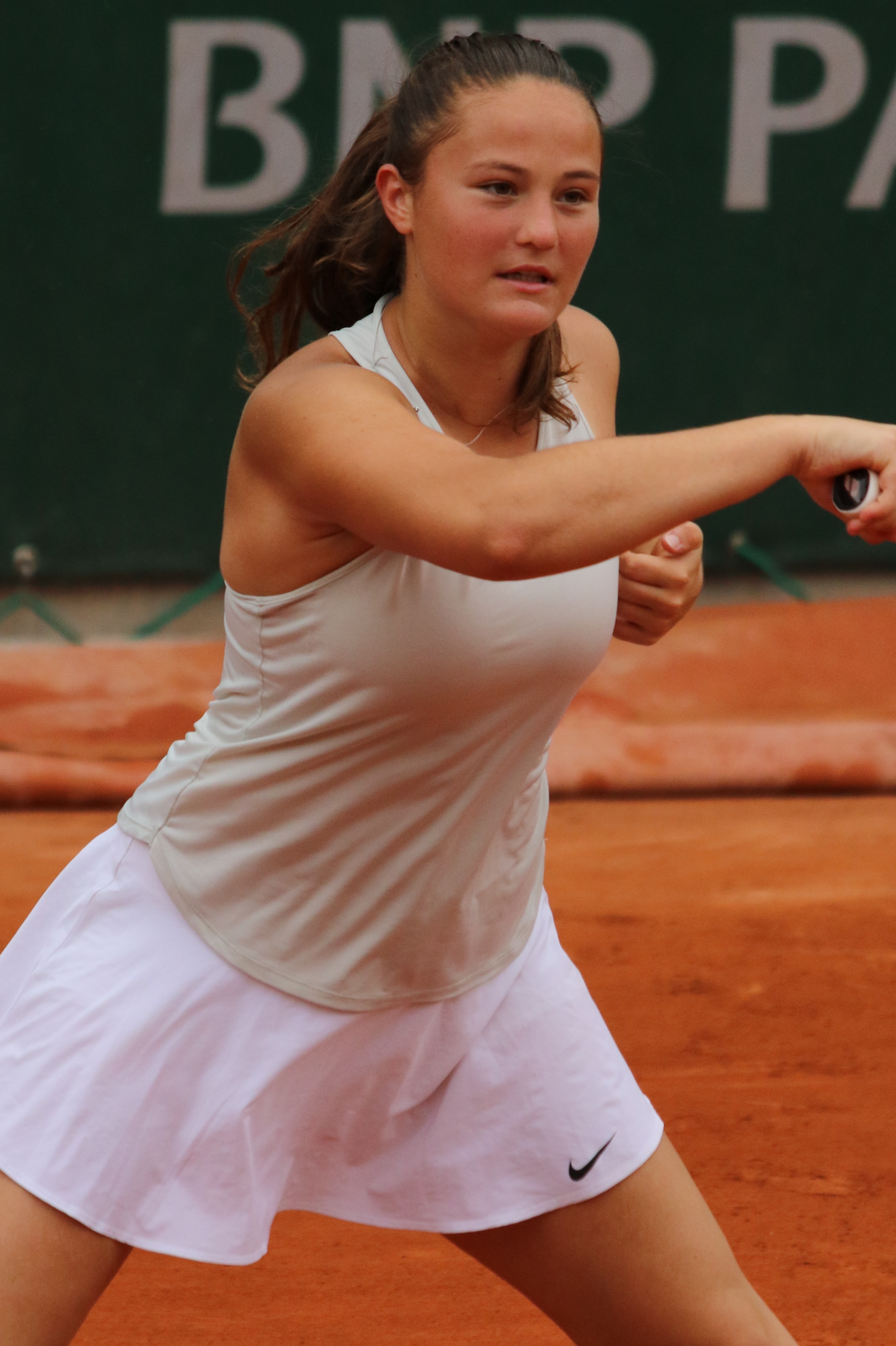 Droguet RG19 (7)